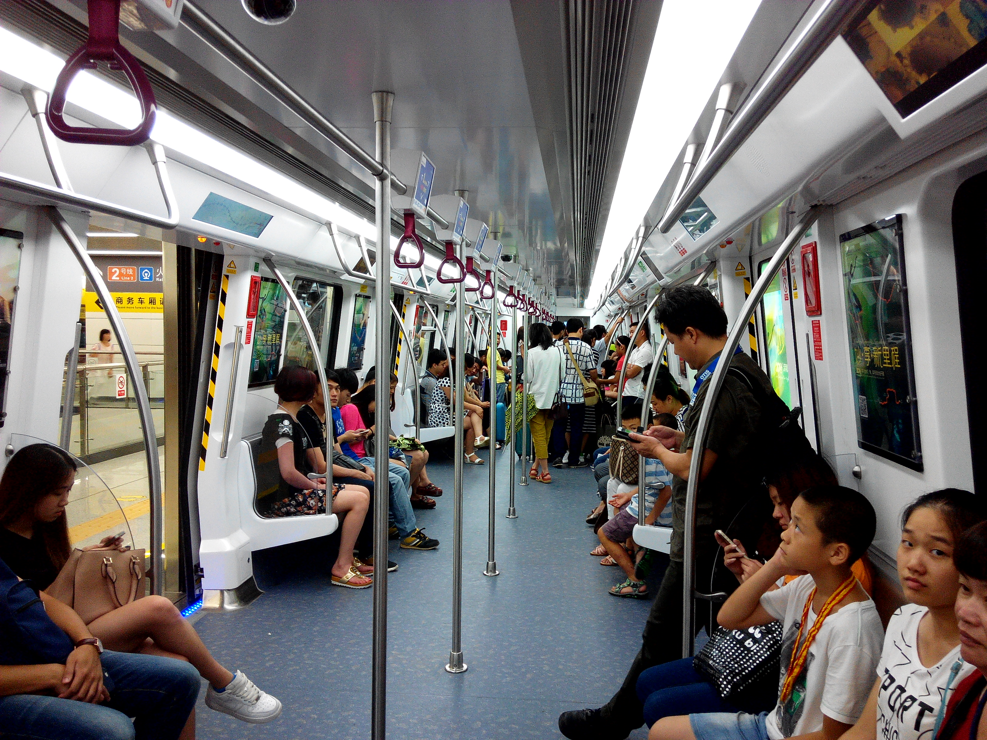 深圳地铁11号线2015款中车株机A型列车普通车厢内饰